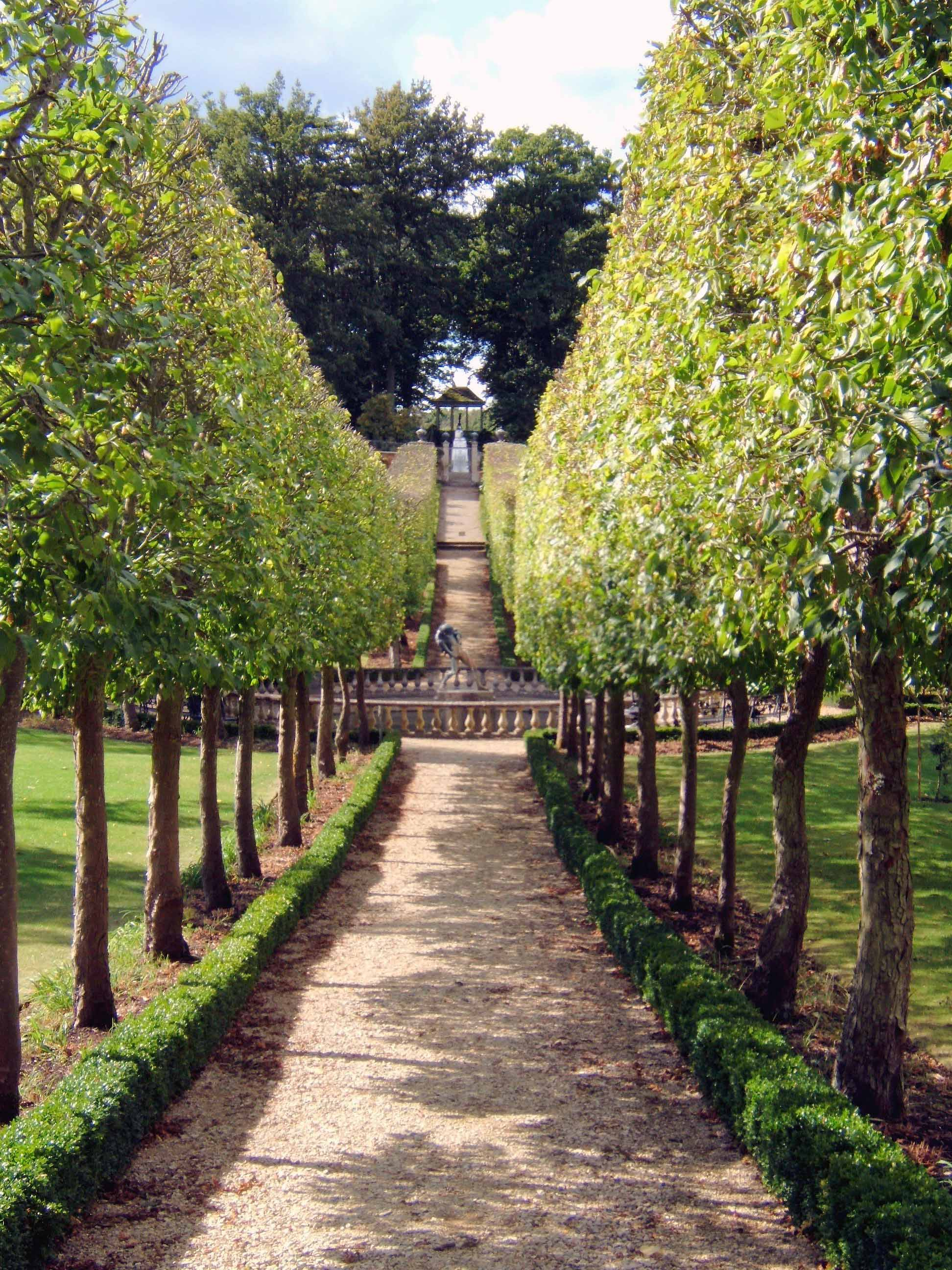 Landscape avenue - Buscot Park